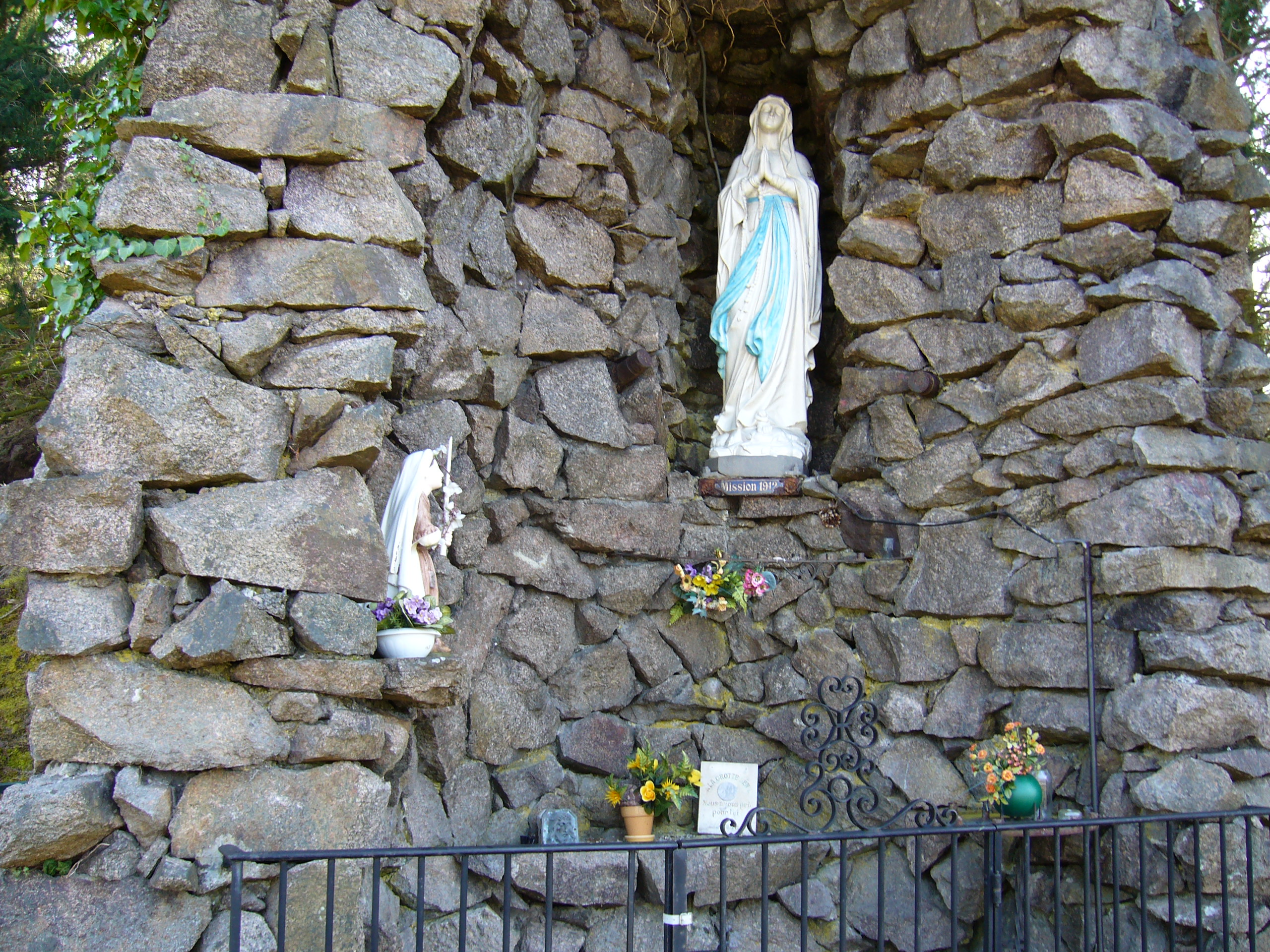 Grotte de Notre Dame de Lourdes sur la colline de Hargoutte.